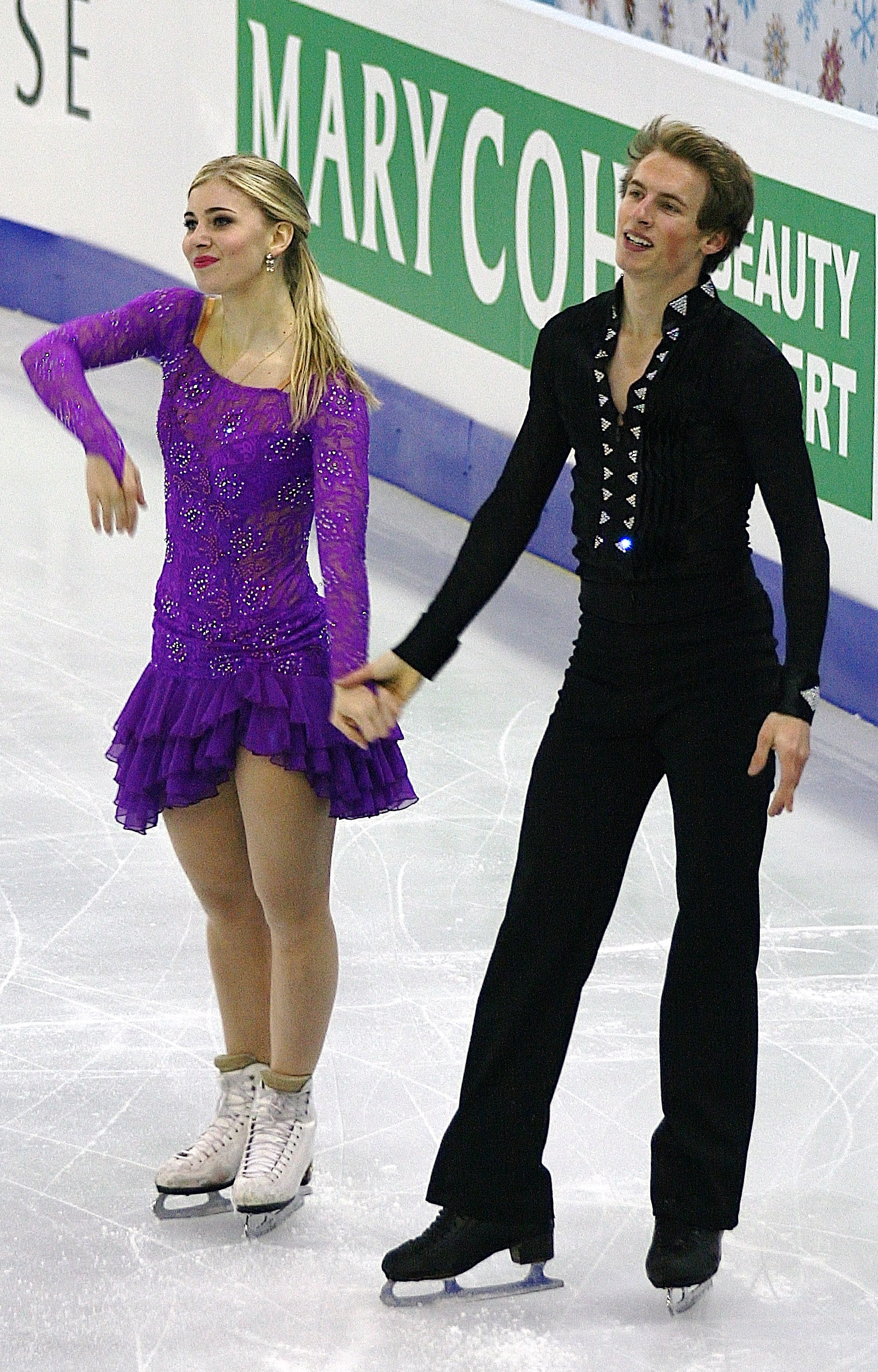 Макензи Бент и Гарретт Маккин (Канада) на финале Гран-при среди юниоров 2014-2015.